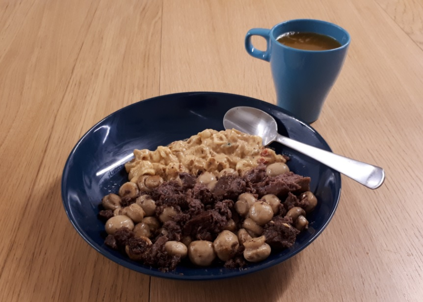 Bear Meat